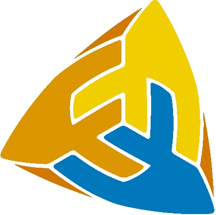 logotipo da ONG Soluções Urbanas